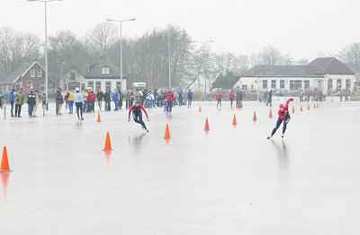 Kortebaanschaatsen